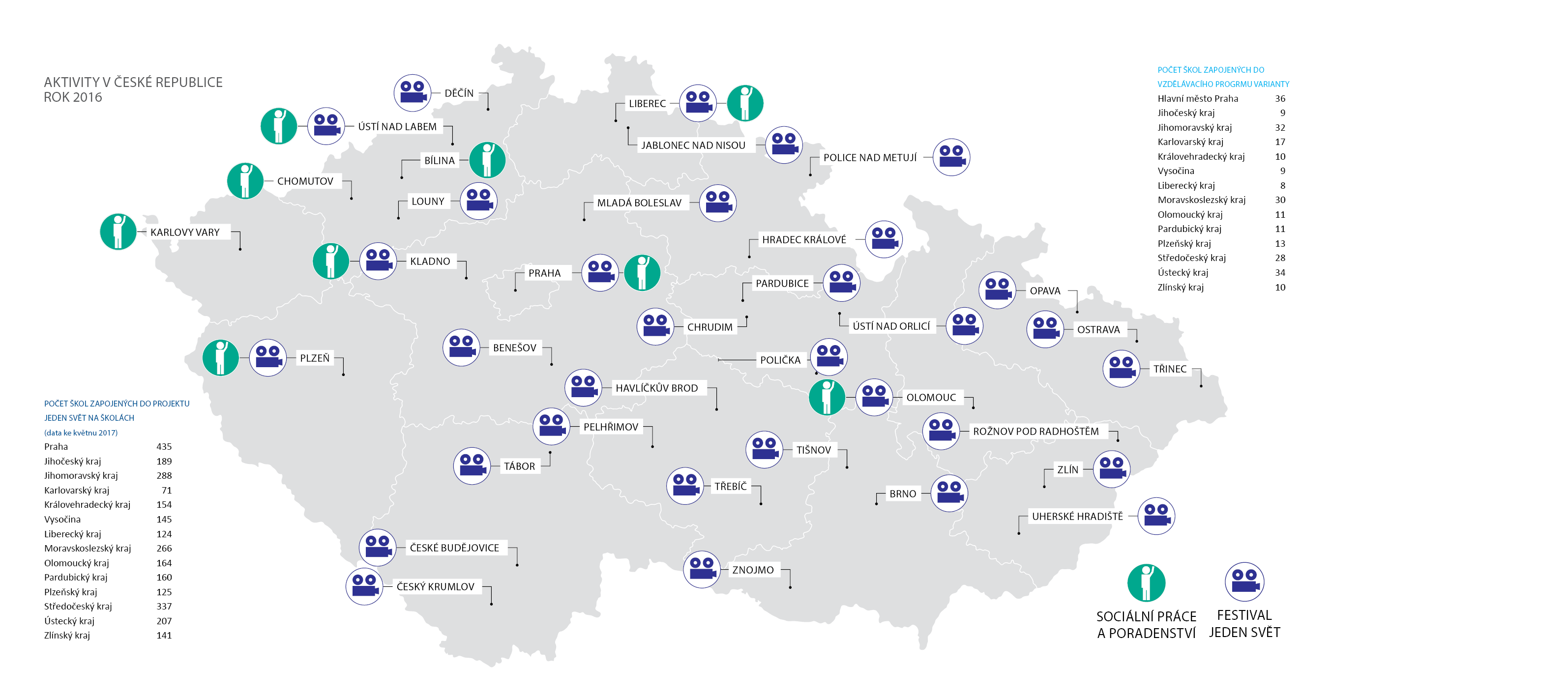 Působení neziskové organizace Člověk v tísni v České republice v roce 2016